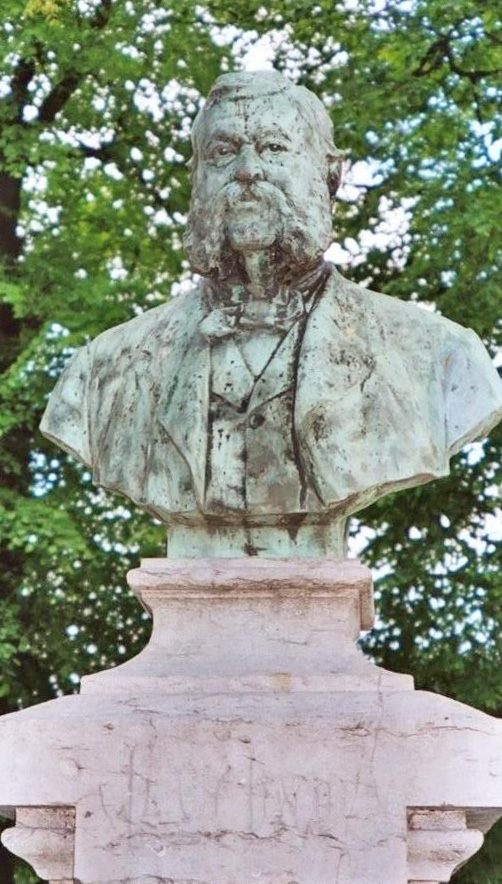 Jean Linden-Statu am Parc Léopold zu Bréissel.